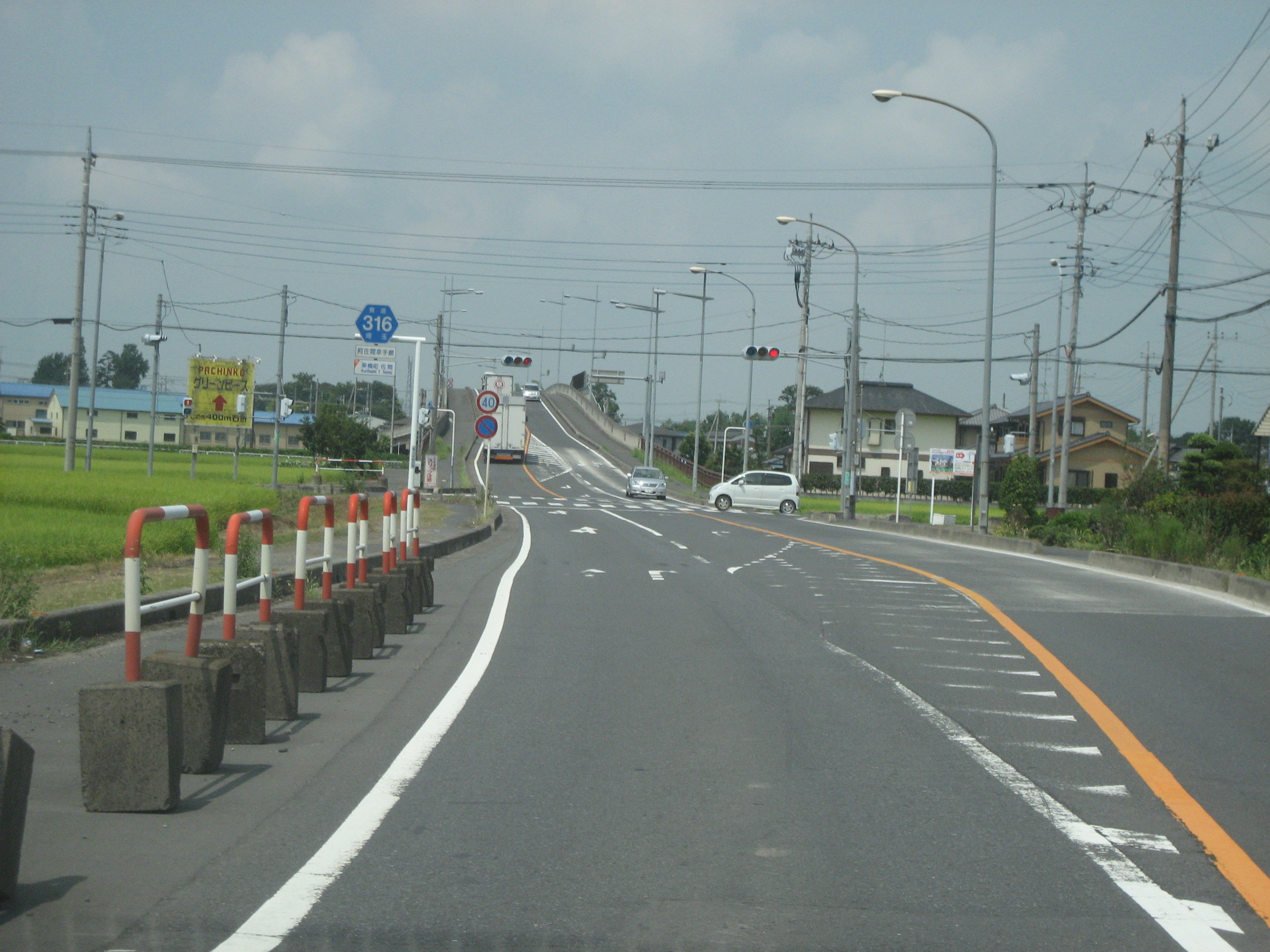 埼玉県道316号線栗橋町内